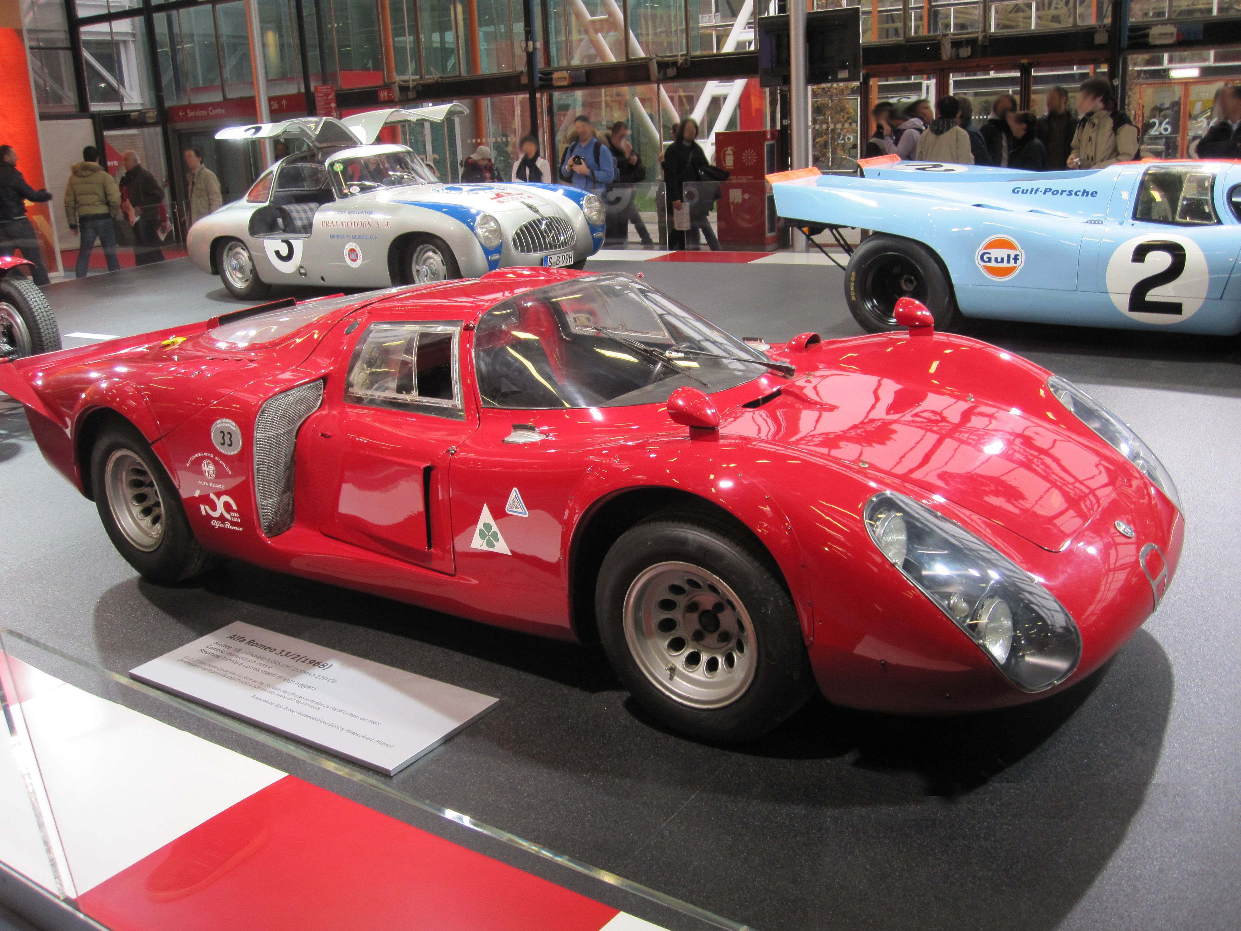 Alfa Romeo 33/2 100 anni Alfa al Motorshow Bologna 2010